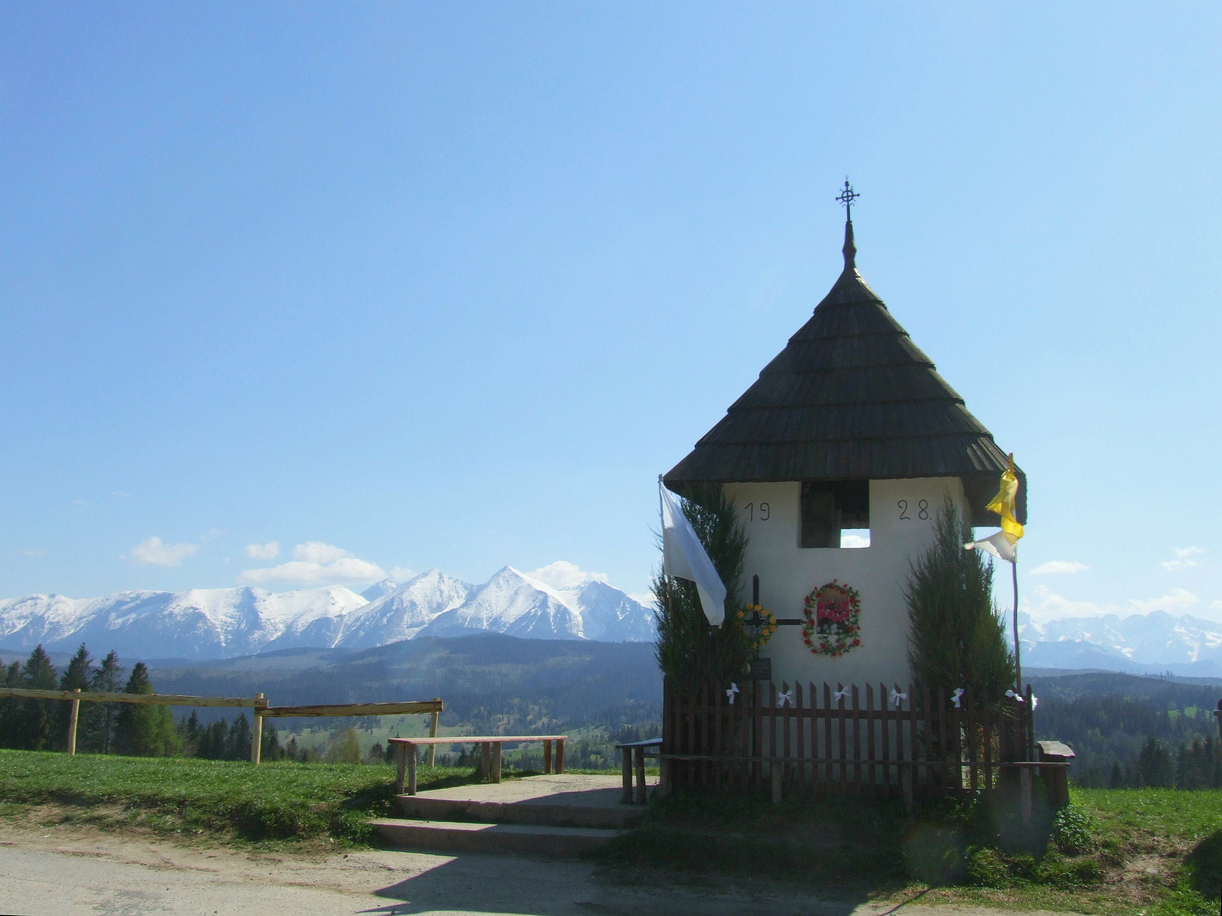 Kapliczka na Łapszańskiej Przełęczy